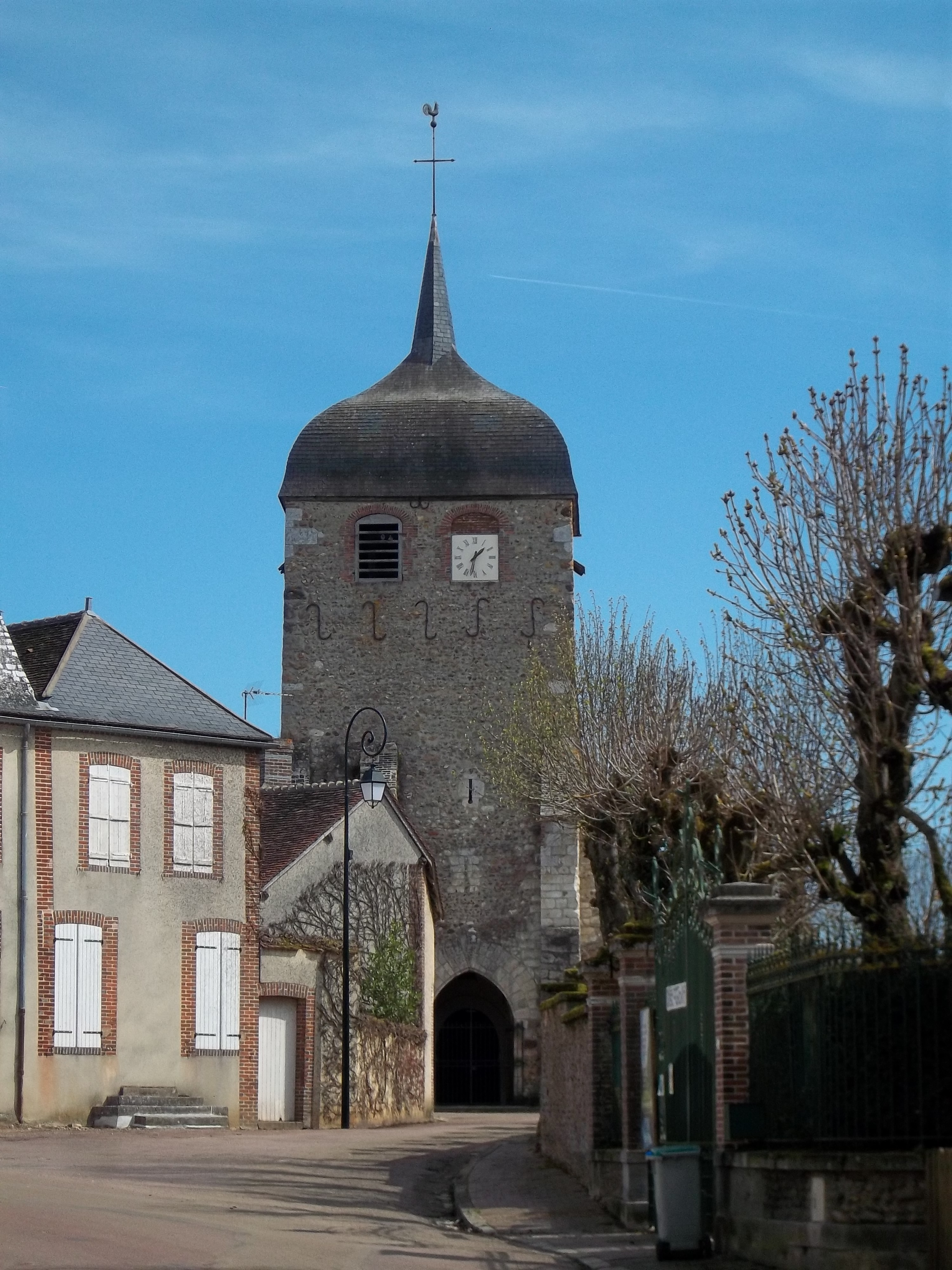 vue de la rue principale